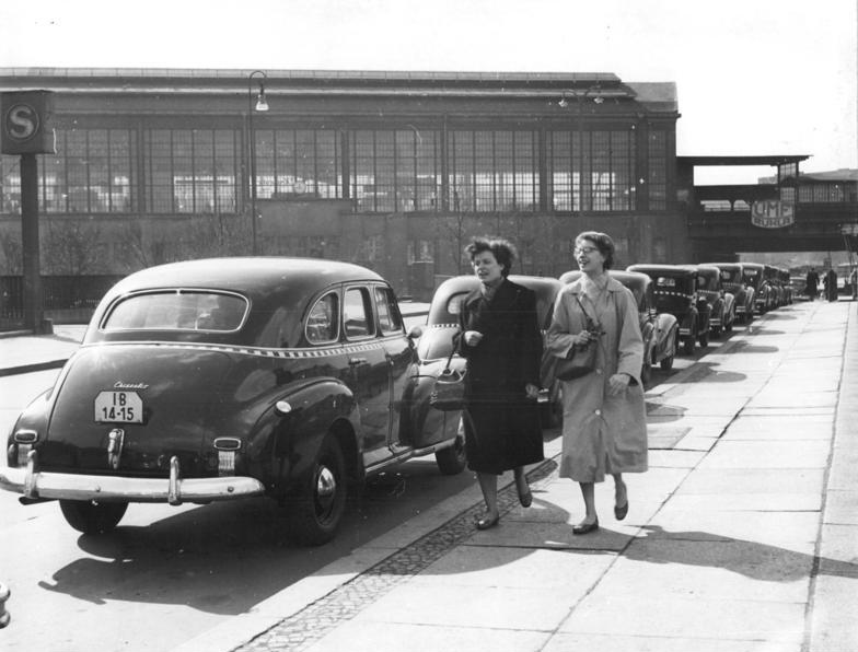 Zentralbild-Zimmermann Zi-Qu 23.3.1957 Am Bahnhof Friedrichstrasse, Berlin UBz. Blick auf die Taxi-Haltestelle.